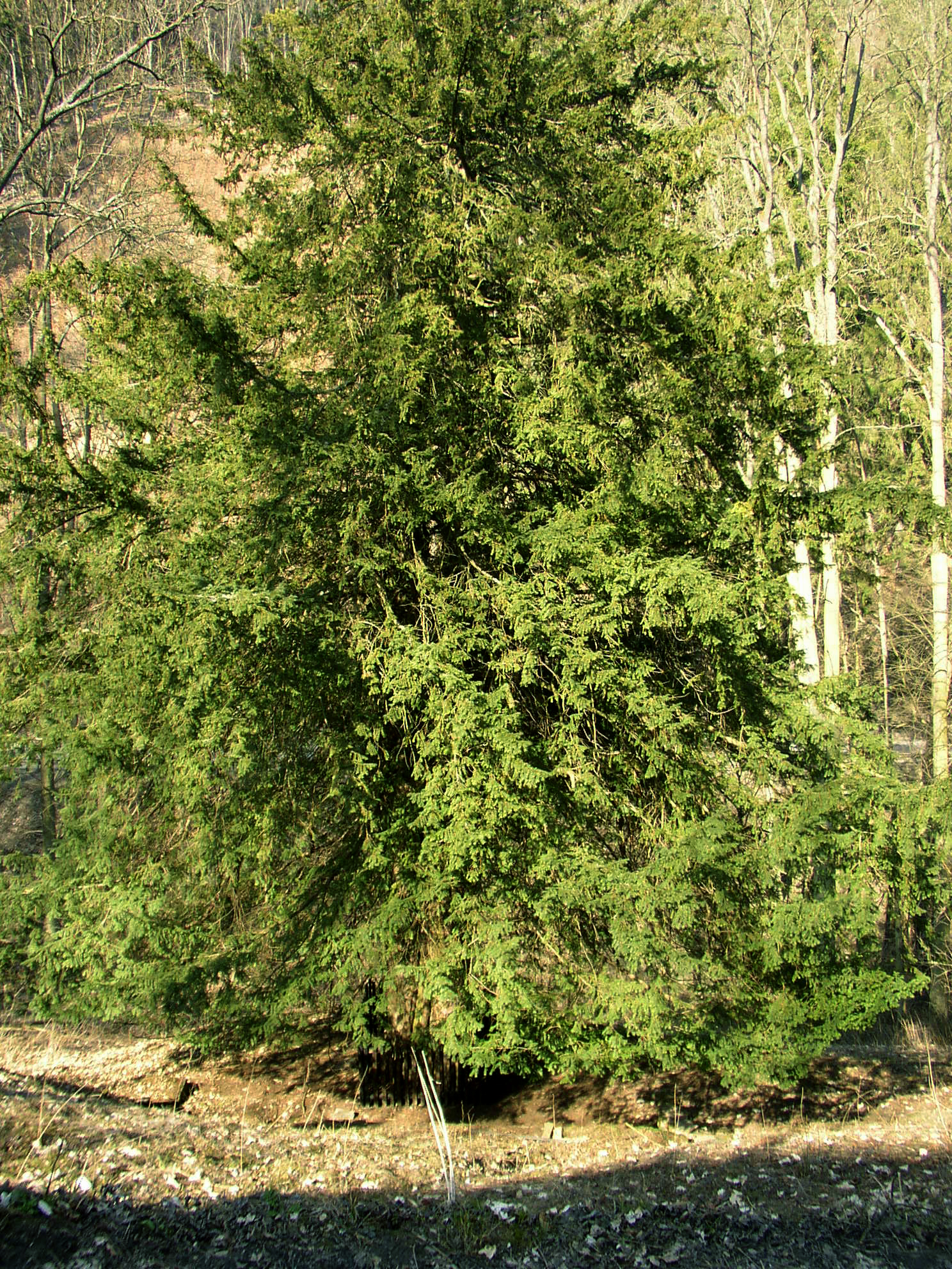 Pernštejnský tis